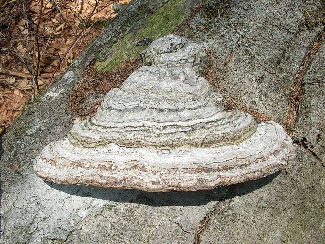 Zunderporling